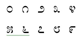 ಕನ್ನಡ: ಕನ್ನಡ ಅಂಕಿಗಳು